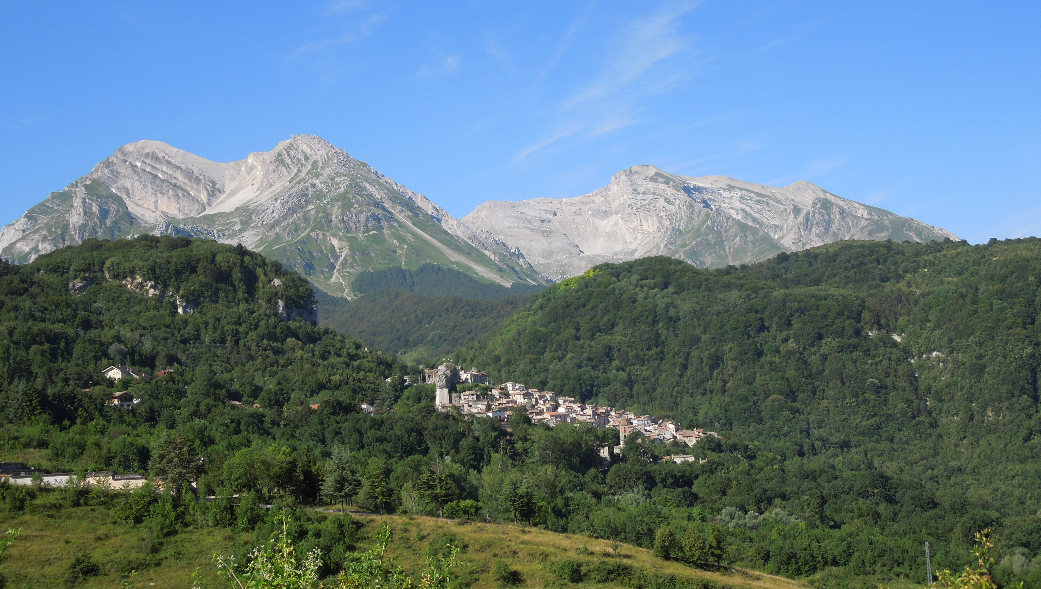 Pietracamela, panorama fotografato dalla strada provinciale che sale a Prati di Tivo